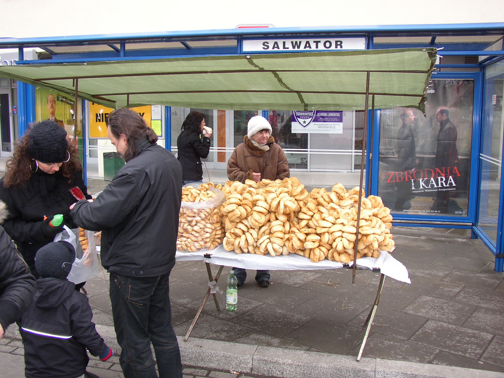 Kraków - Emaus 2008 - stand - cookies